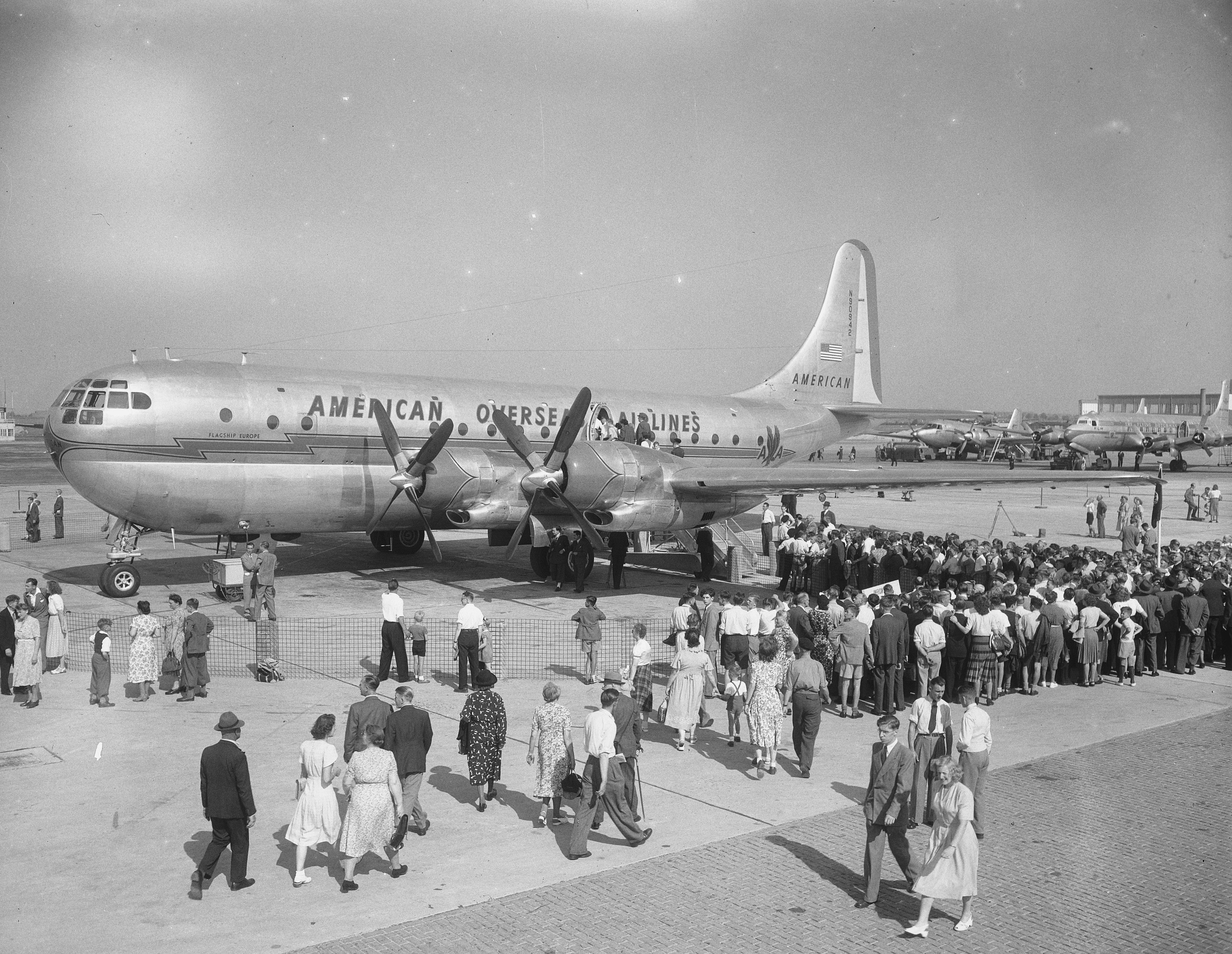 Collectie / Archief : Fotocollectie Anefo Reportage / Serie : [ onbekend ] Beschrijving : Stratocruiser op Schiphol Datum : 4 september 1949 Instellingsnaam : Boeing C-97 Stratocruiser Fotograaf : Merk, Ben / Anefo Auteursrechthebbende : Nationaal Archief Materiaalsoort : Glasnegatief Nummer archiefinventaris : bekijk toegang 2.24.01.09 Bestanddeelnummer : 903-5913